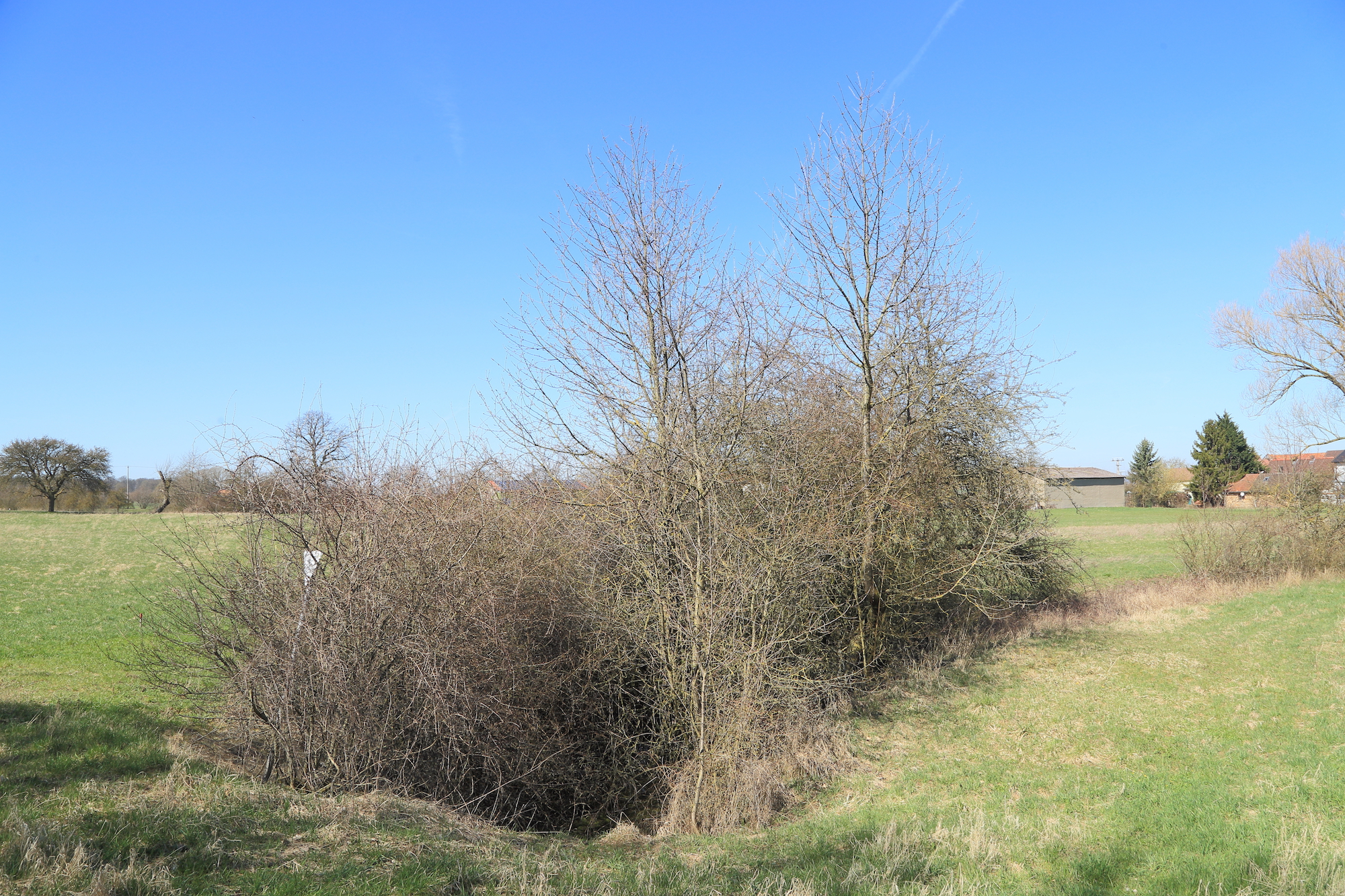 Gipskarstquelle S von Falkenstein Geotop-Nummer: 678Q003 6028GT000006 Donnersdorf Schweinfurt 6028 Gerolzhofen R: 4387366 H: 5536891 277 m ü.NN Quellen im Grundgips sind meist an den Ausbiss der Gipsschichten gebunden. Die Förderung erfolgt über Karstwege in den Gips führenden Schichten. Myophorienschichten (Obertrias)/Gips; Tonstein; Mergelstein Hanganriss/Felswand (natürlich)/Grundwasser aufgeschlossen, Wasserzu/-abflüsse/Naturdenkmal lfu. Bayern